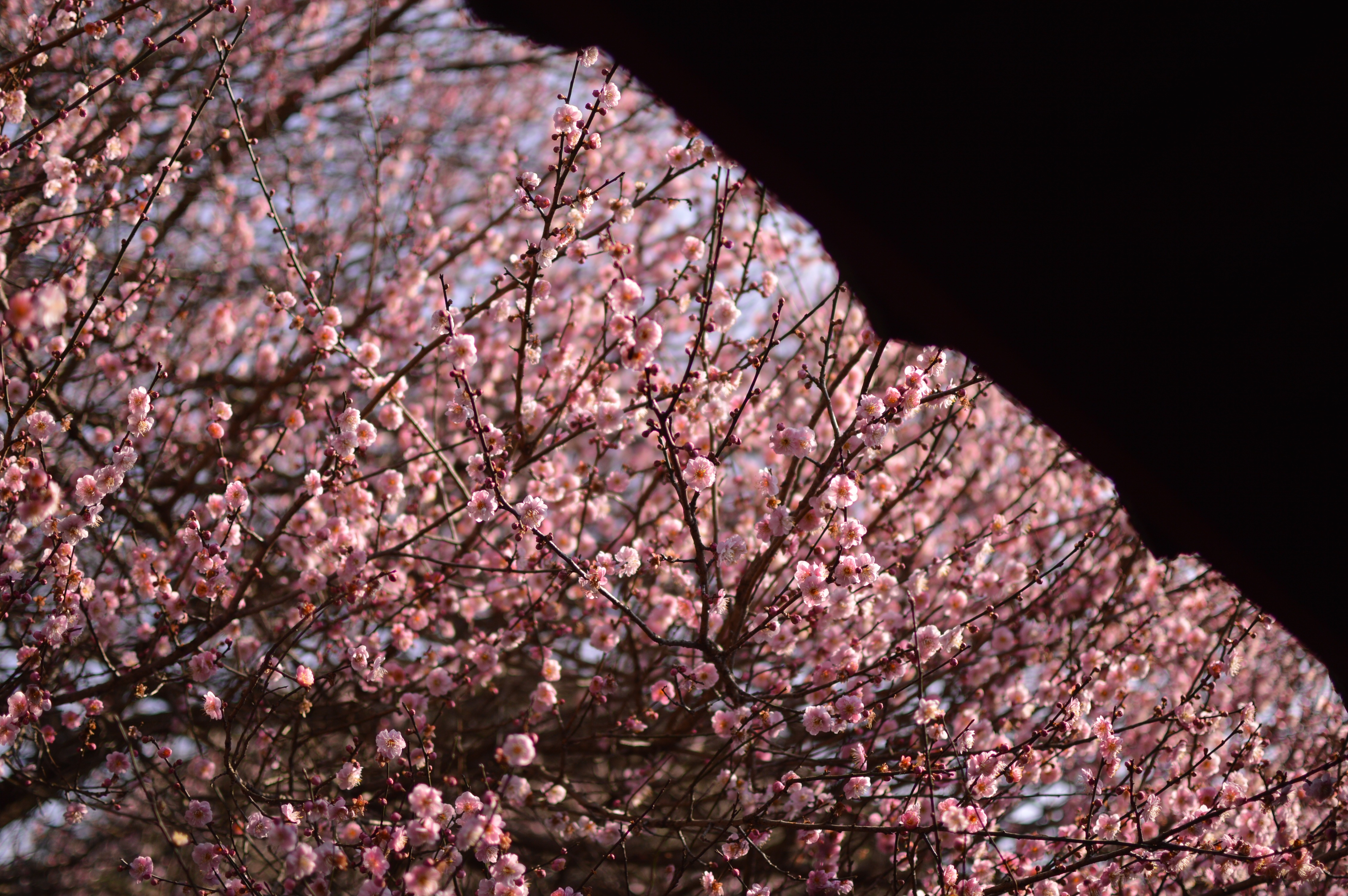 20190128林阳寺梅花